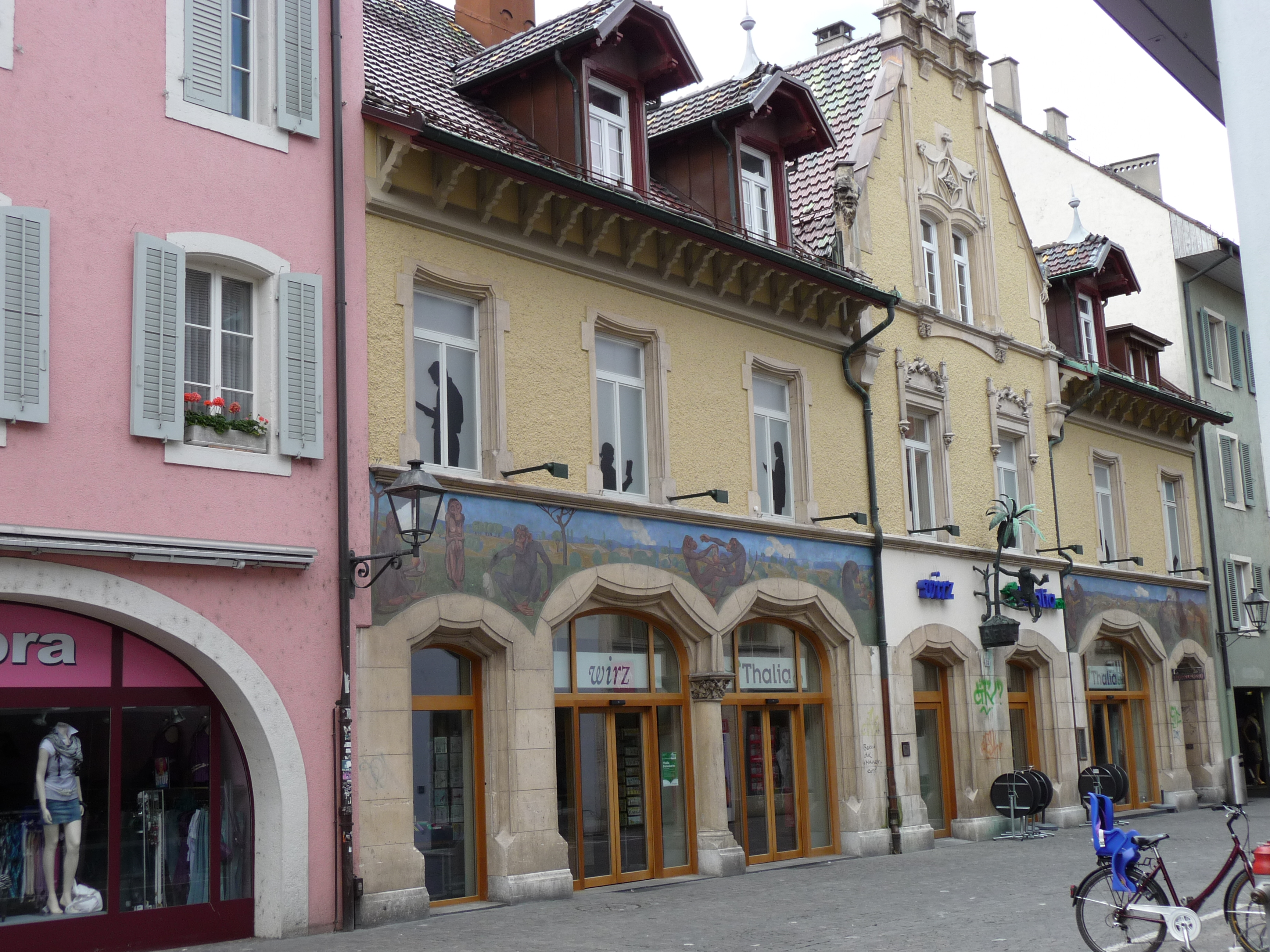 Aff in Aarau